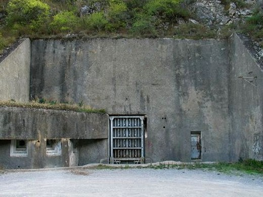 Entrée de l'ouvrage de Castillon.